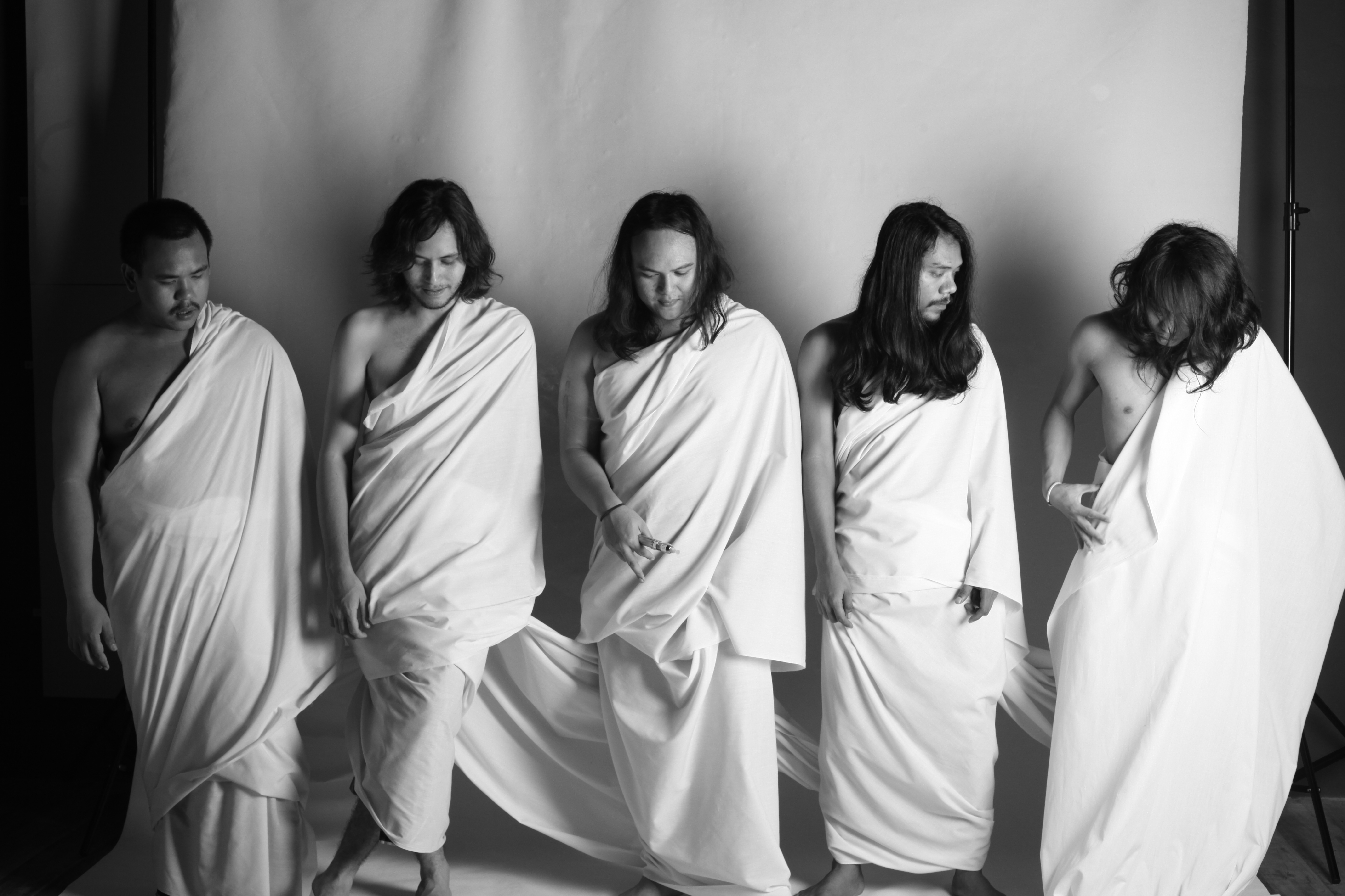 Foto diambil waktu sesi penggambaran album Fonetik Anak Candal